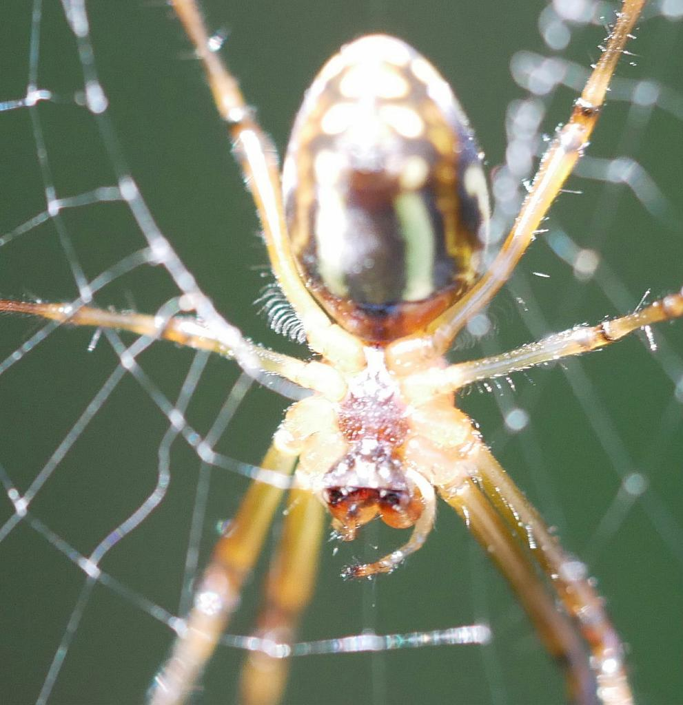 2019/05/23 和歌山県田辺市：Tanabe City. Wakayama Pref. Japan